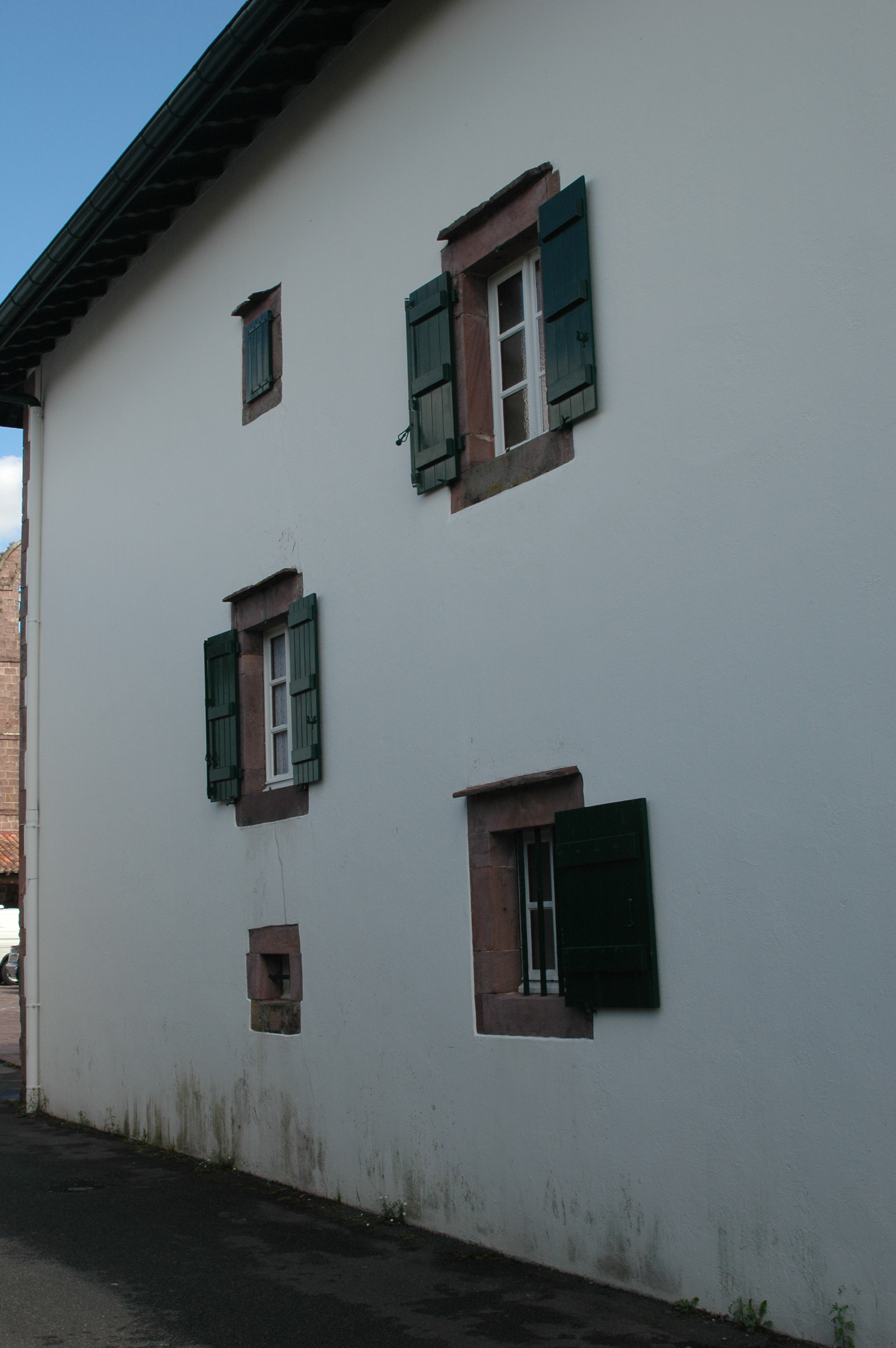 Bidarray, détail d'une maison. Photo prise le 03/08/06 par Harrieta171